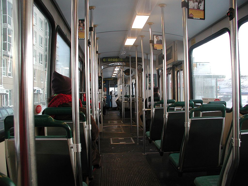 Innenraum einer NR-1-Tram aus Helsiki